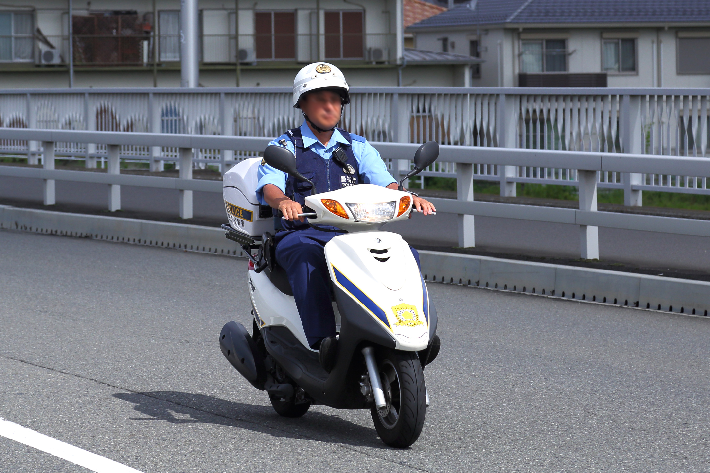 ヤマハ アクシストリートの警察車両（日野警察署）